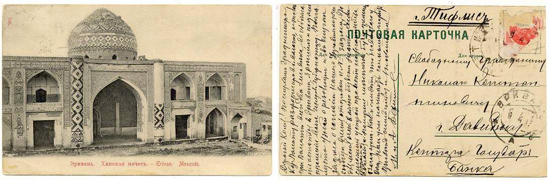 Почтовая карточка. Эривань. Ханская мечеть, 1917. Поврежденная марка 1916 года с портретом Александра III, 3 коп.